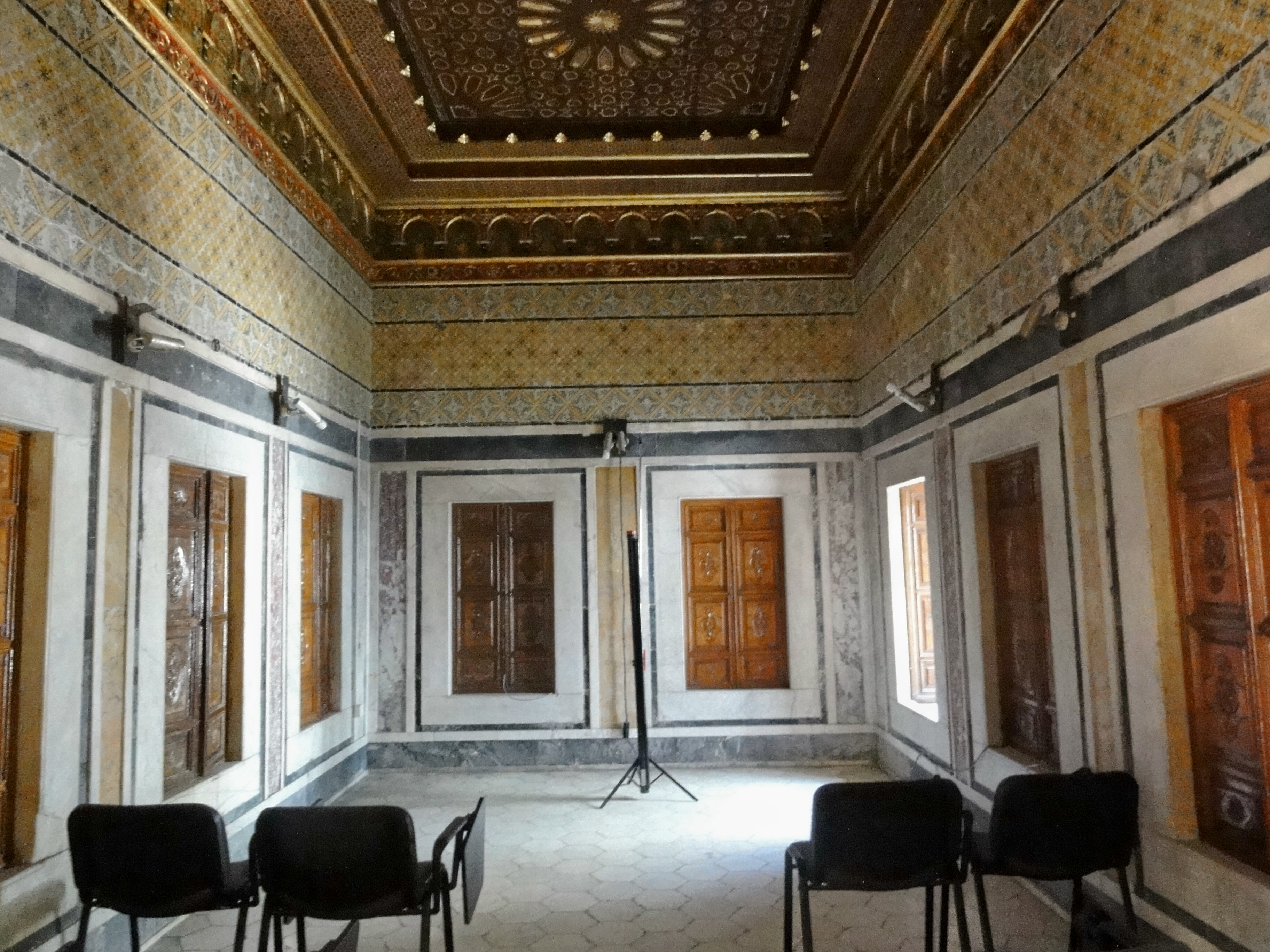 Une des salles du Dar Lasram, palais du XVIIIe dans la médina de Tunis